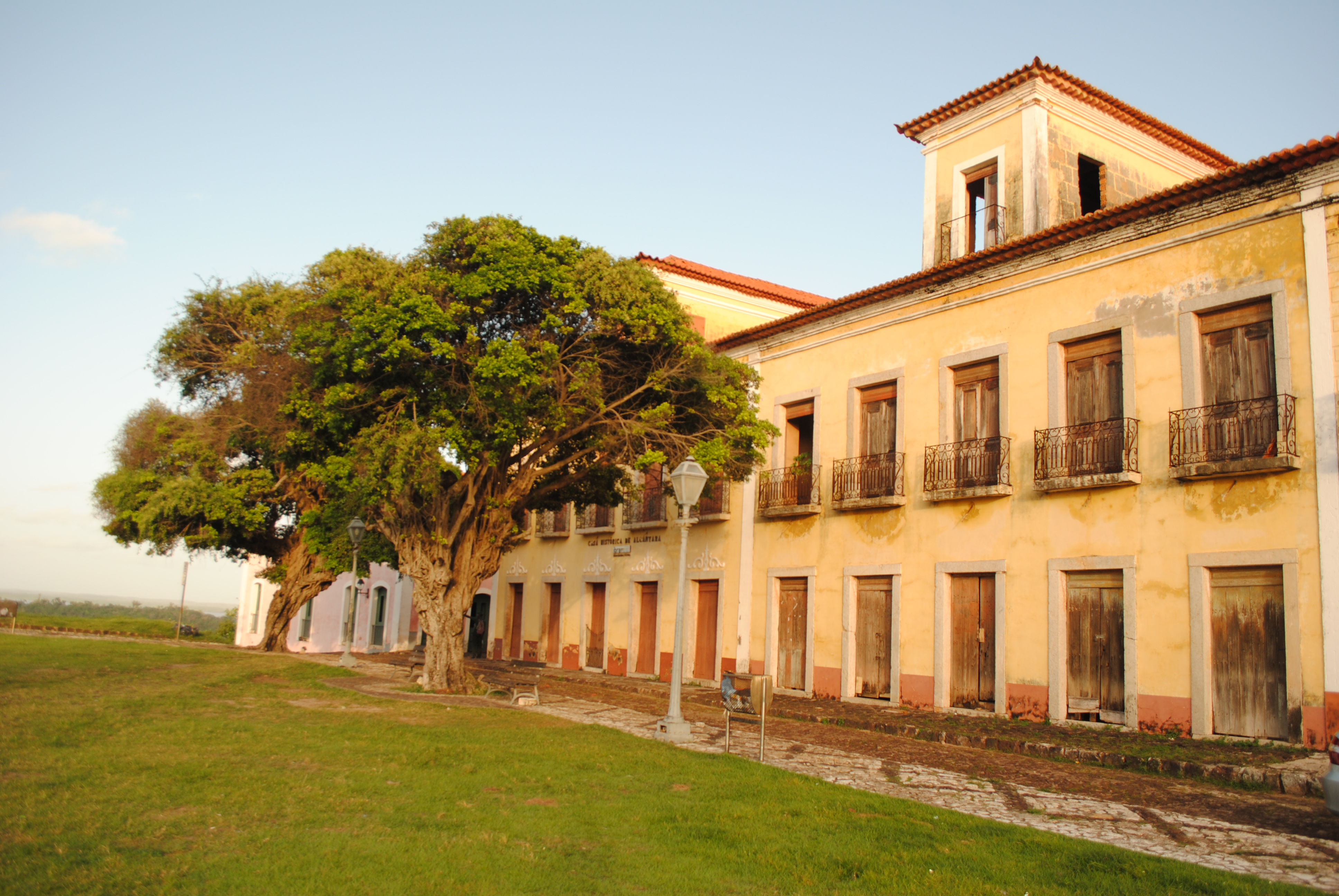 Fachada do Museu Casa Histórica de Alcântara, Praça da Matriz, árvores figueiras.